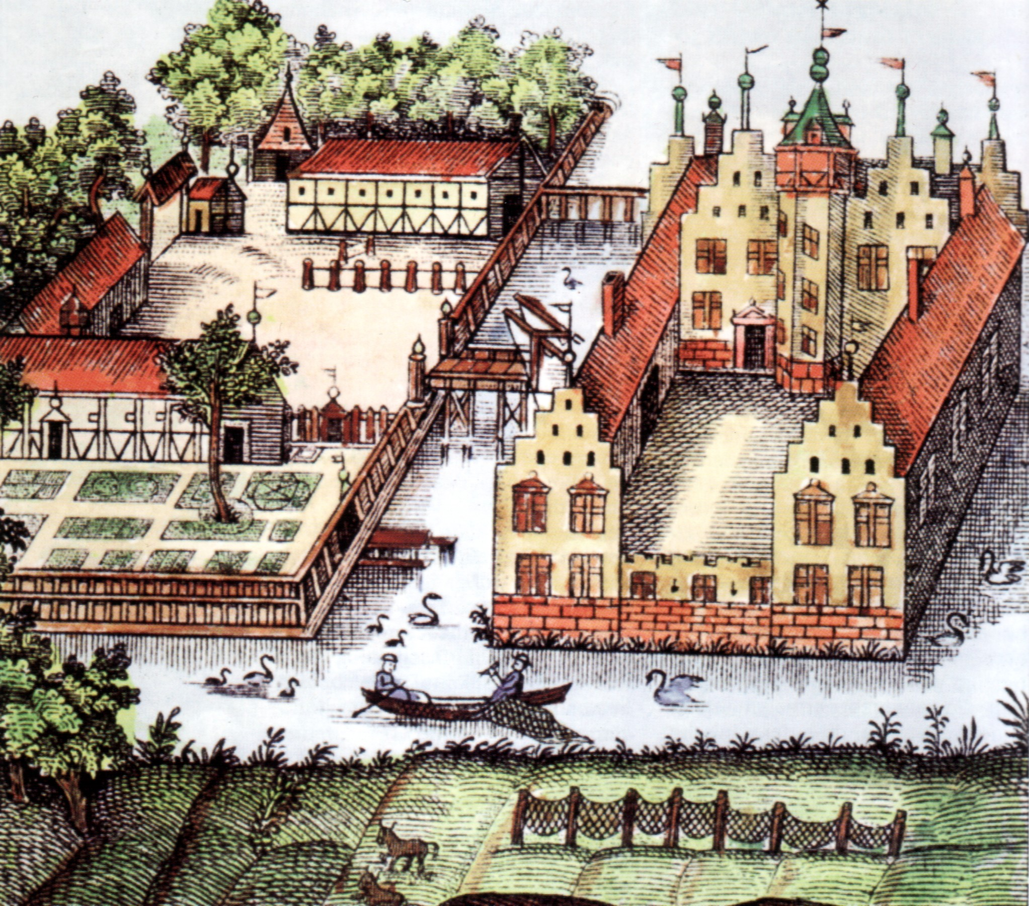 Die Wandesburg in Wandsbek bei Hamburg, kolorierter Holzschnitt von Peter Lindenberg